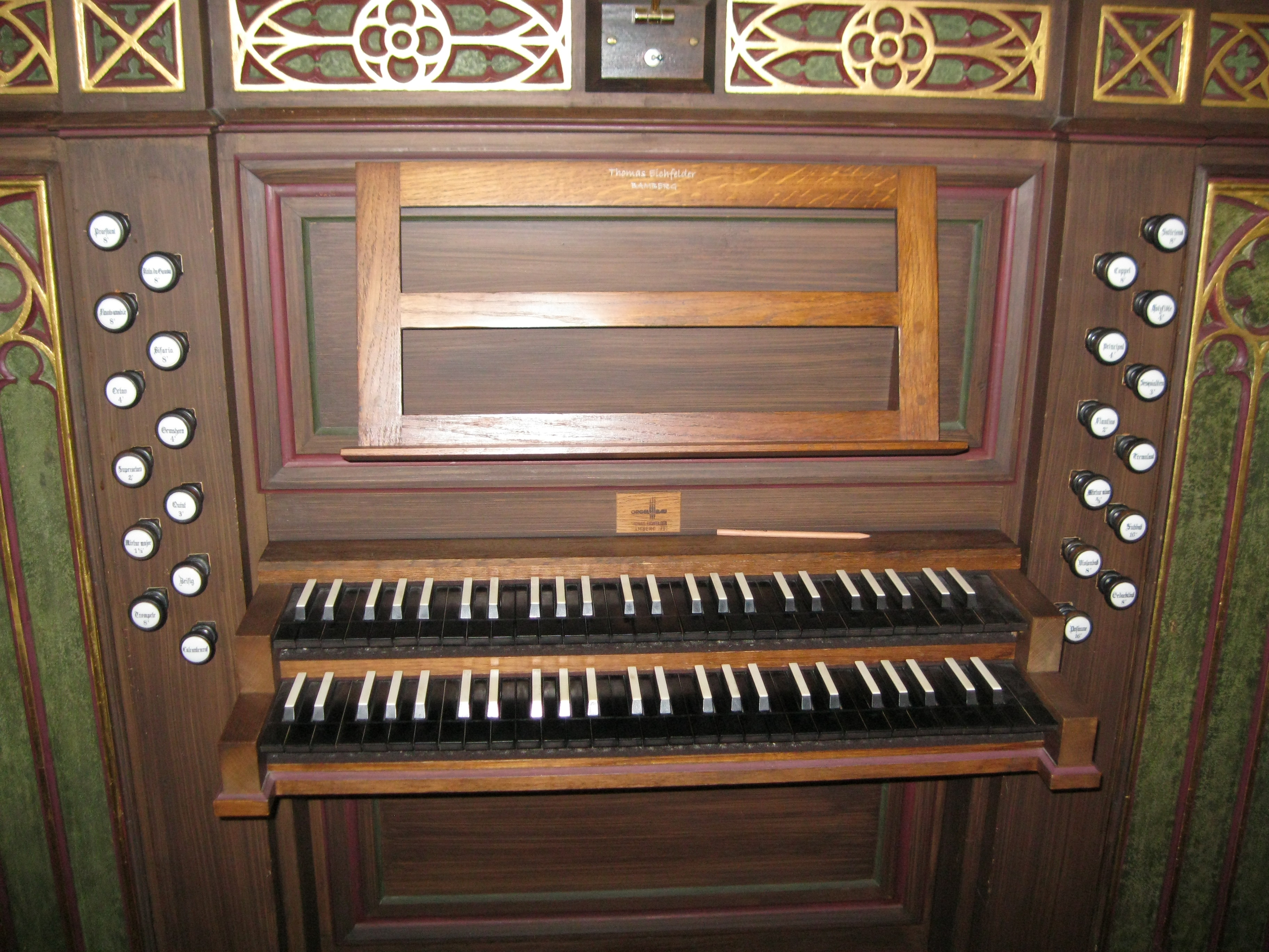 Spieltisch der Orgel in der Pfarrkirche Mariä Himmelfahrt in Memmelsdorf